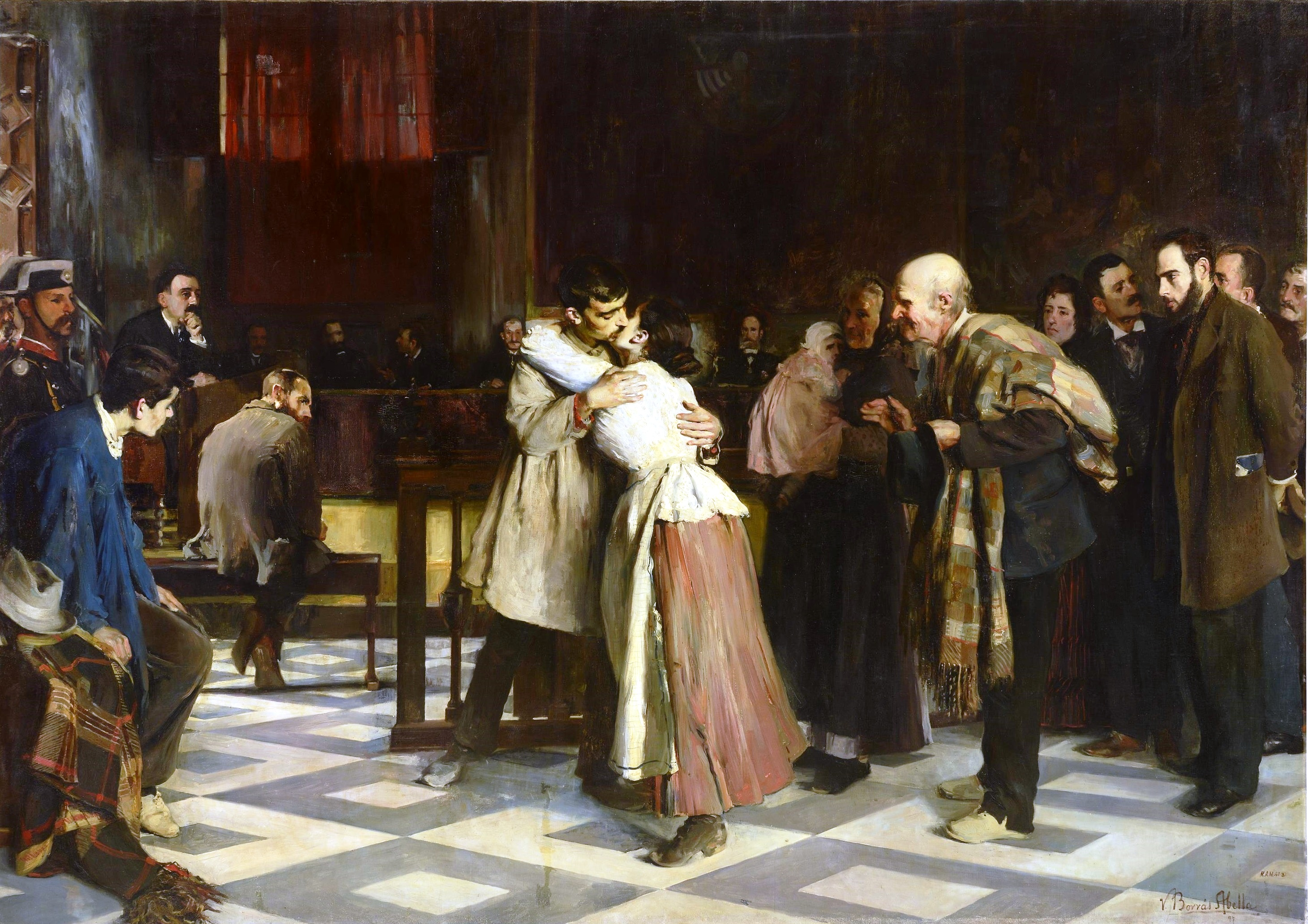 La obra representa a un hombre besando a su mujer después de haber sido absuelto en un proceso judicial y en presencia del tribunal.